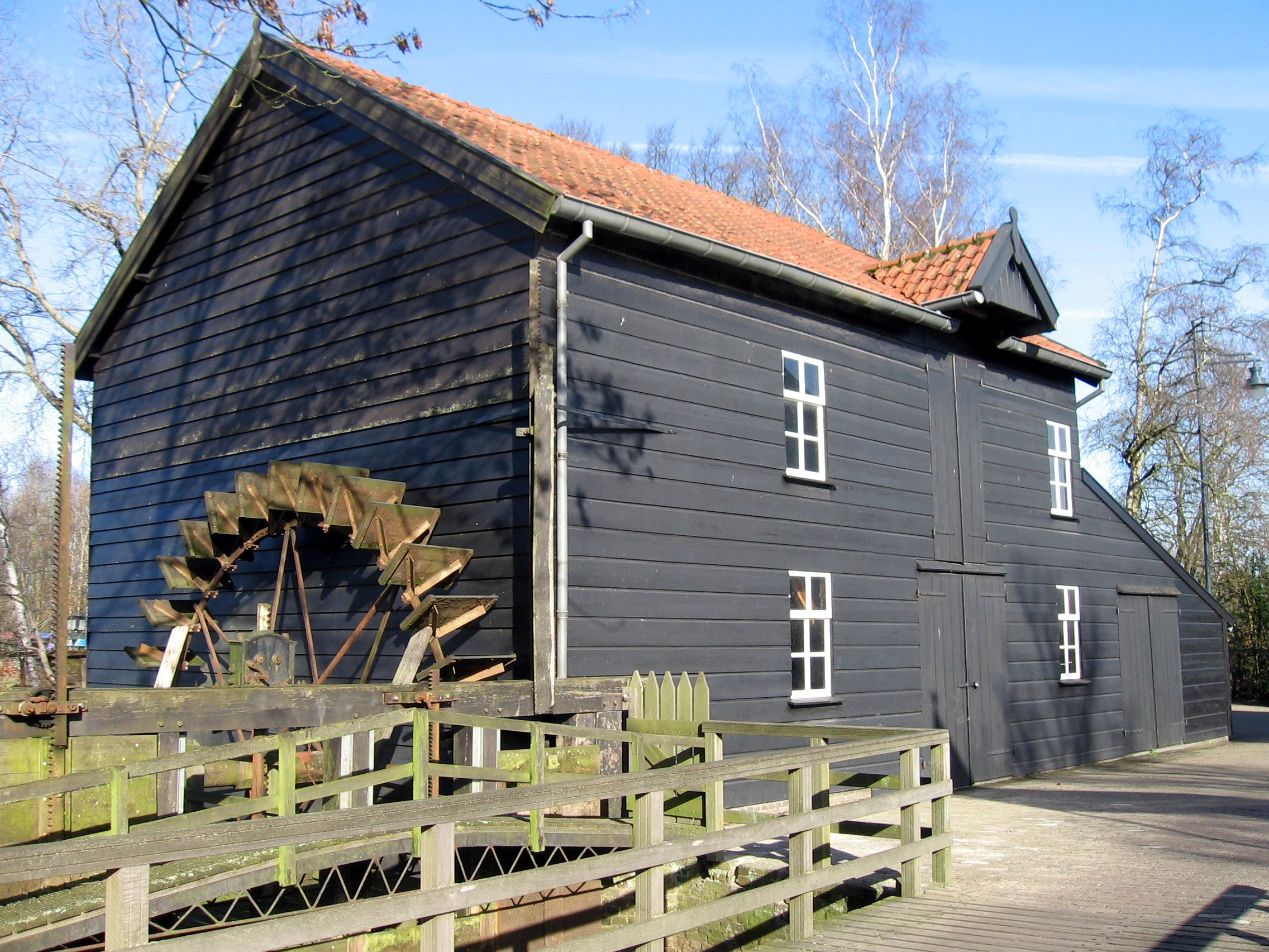 Picture of watermill in Venbergen Valkenswaard (the Netherlands)